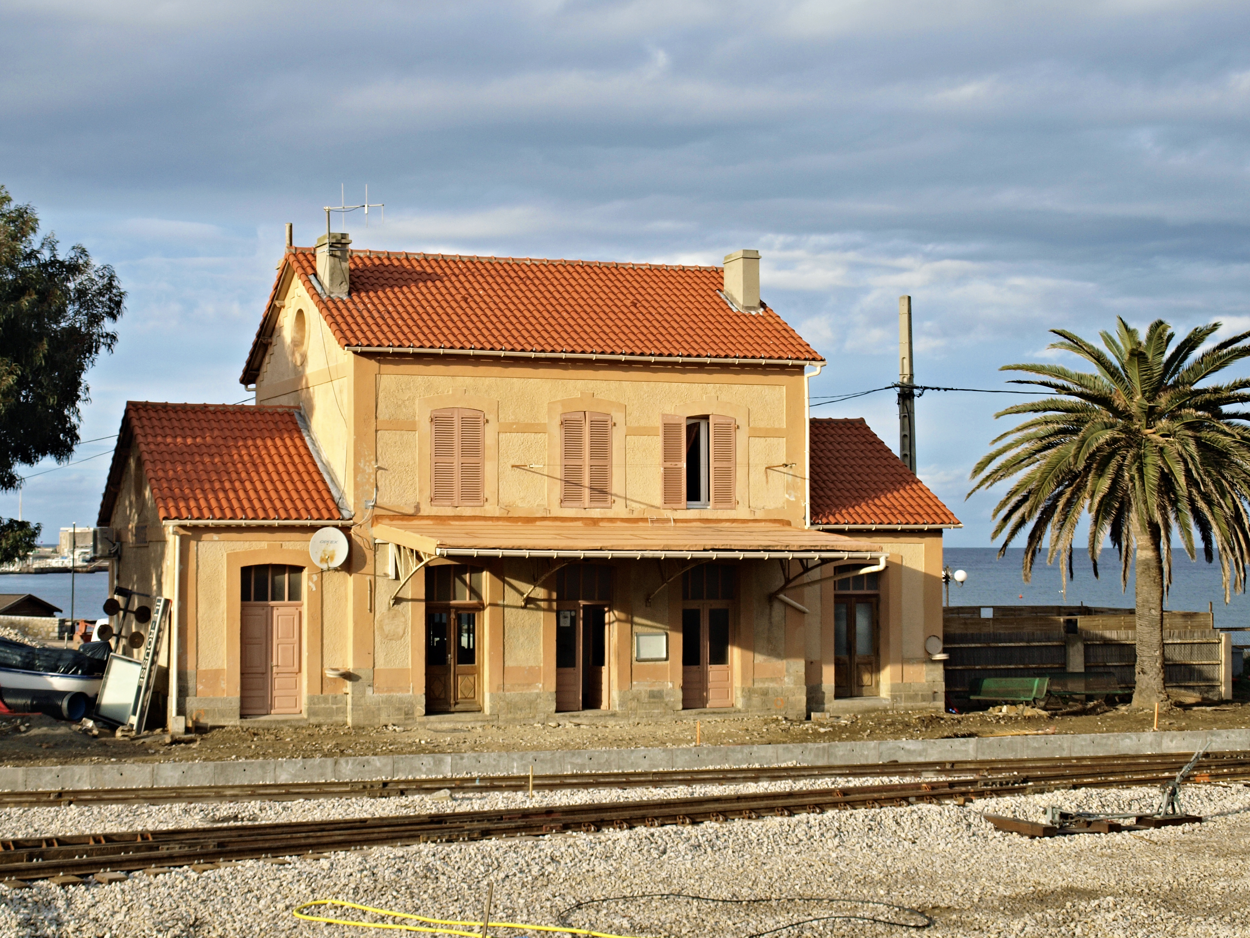 L'Île-Rousse (Corsica) - La gare et la voie ferrée en réfection (2010)